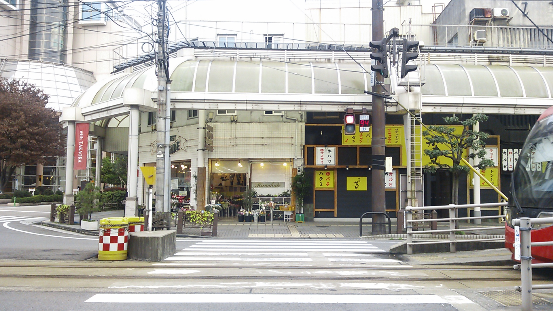 末広町停留場そばの交差点/横断歩道。右側(南東側)から此処までが末広町商店街で、この交差点から左側(北西側)が末広坂商店街である。